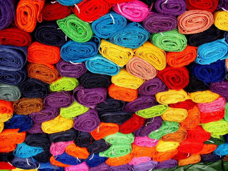 fabric colorscolor